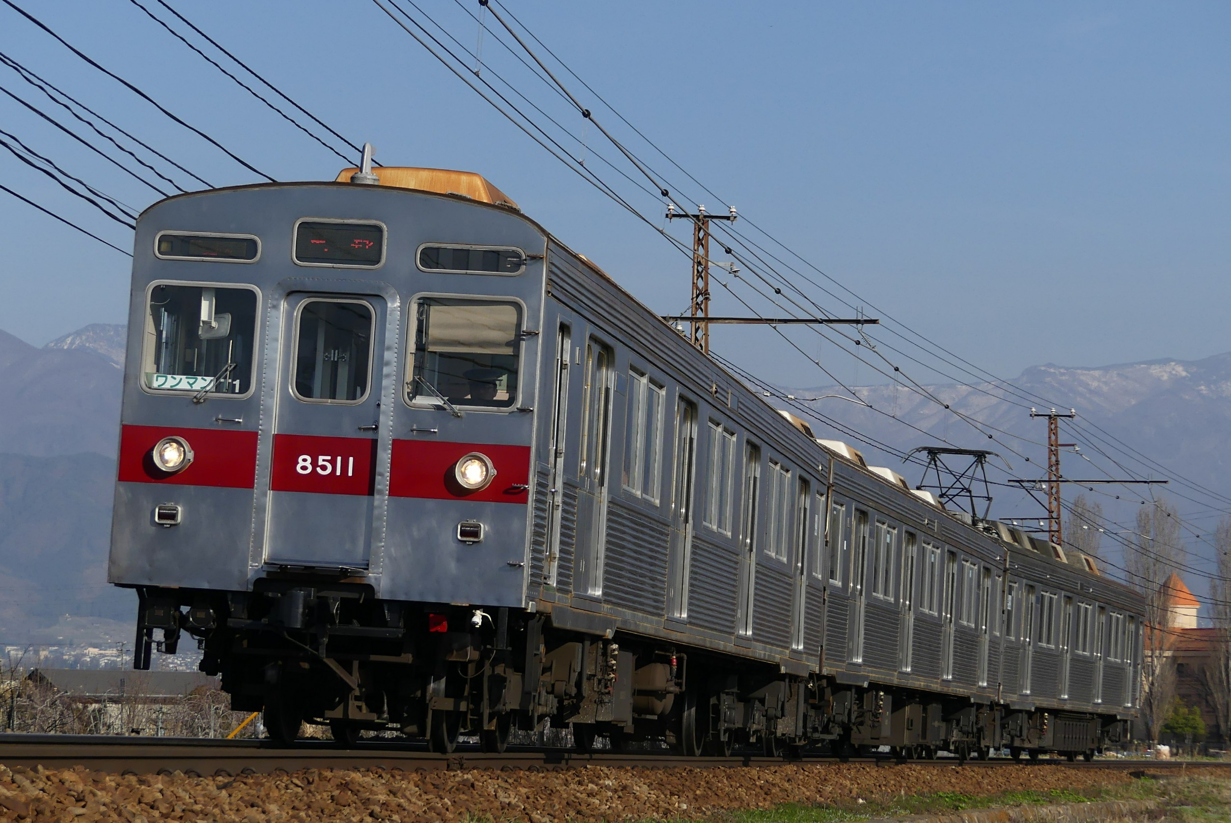 長野電鉄8500系電車